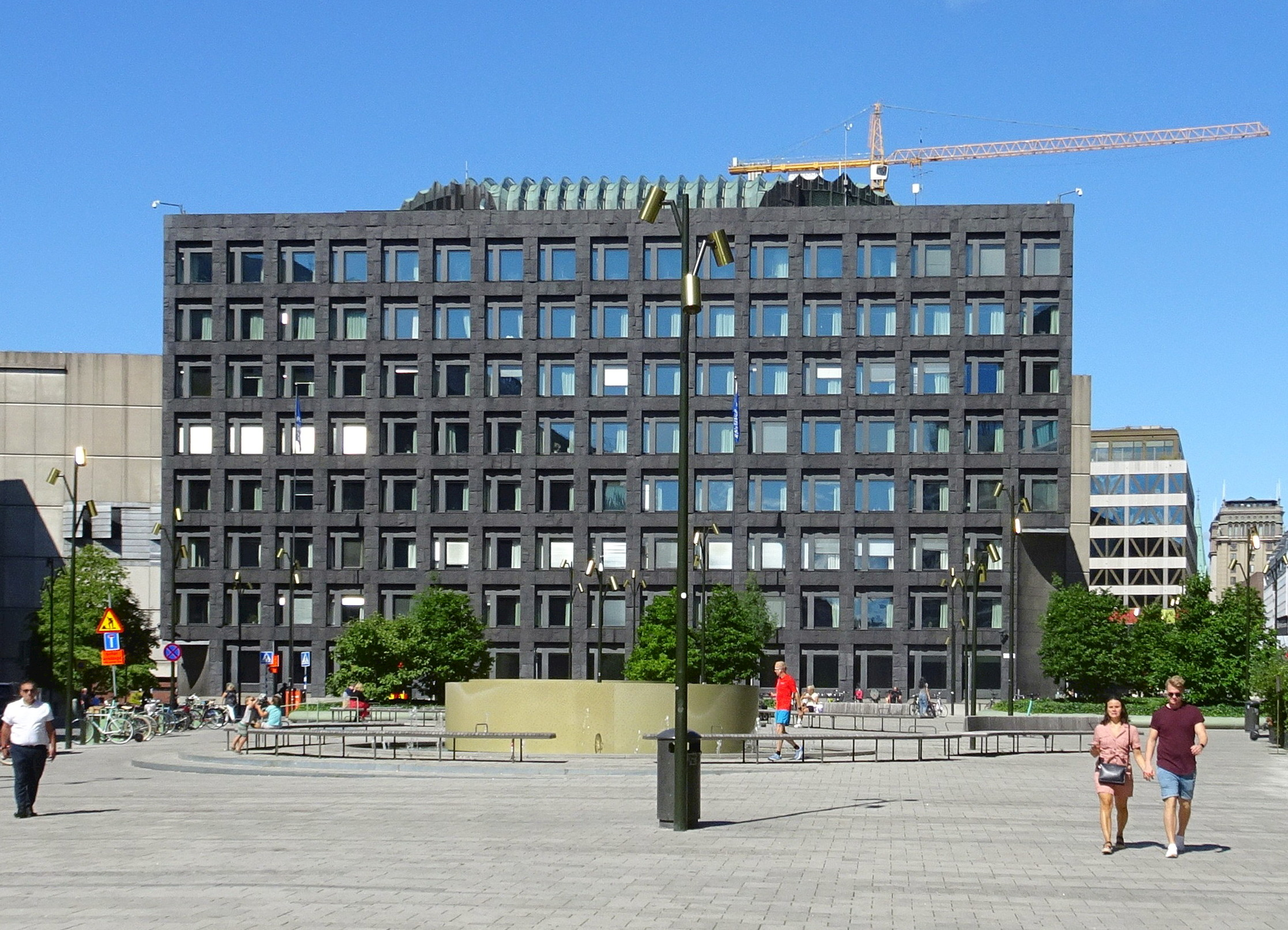 Sveriges Riksbank, fasad mot Brunkebergstorg